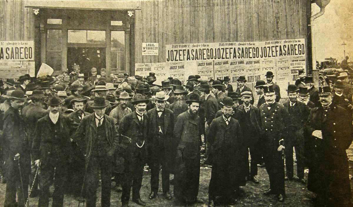 1907 wybory do Rady Państwa lub Sejmu Krajowego Galicji na krakowskim Kazimierzu